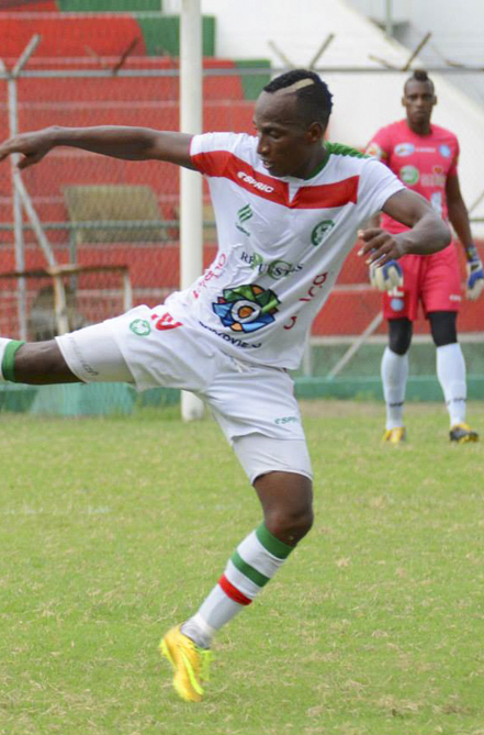 Jefferson Cuellar jugando para 5 de Julio en el 2015